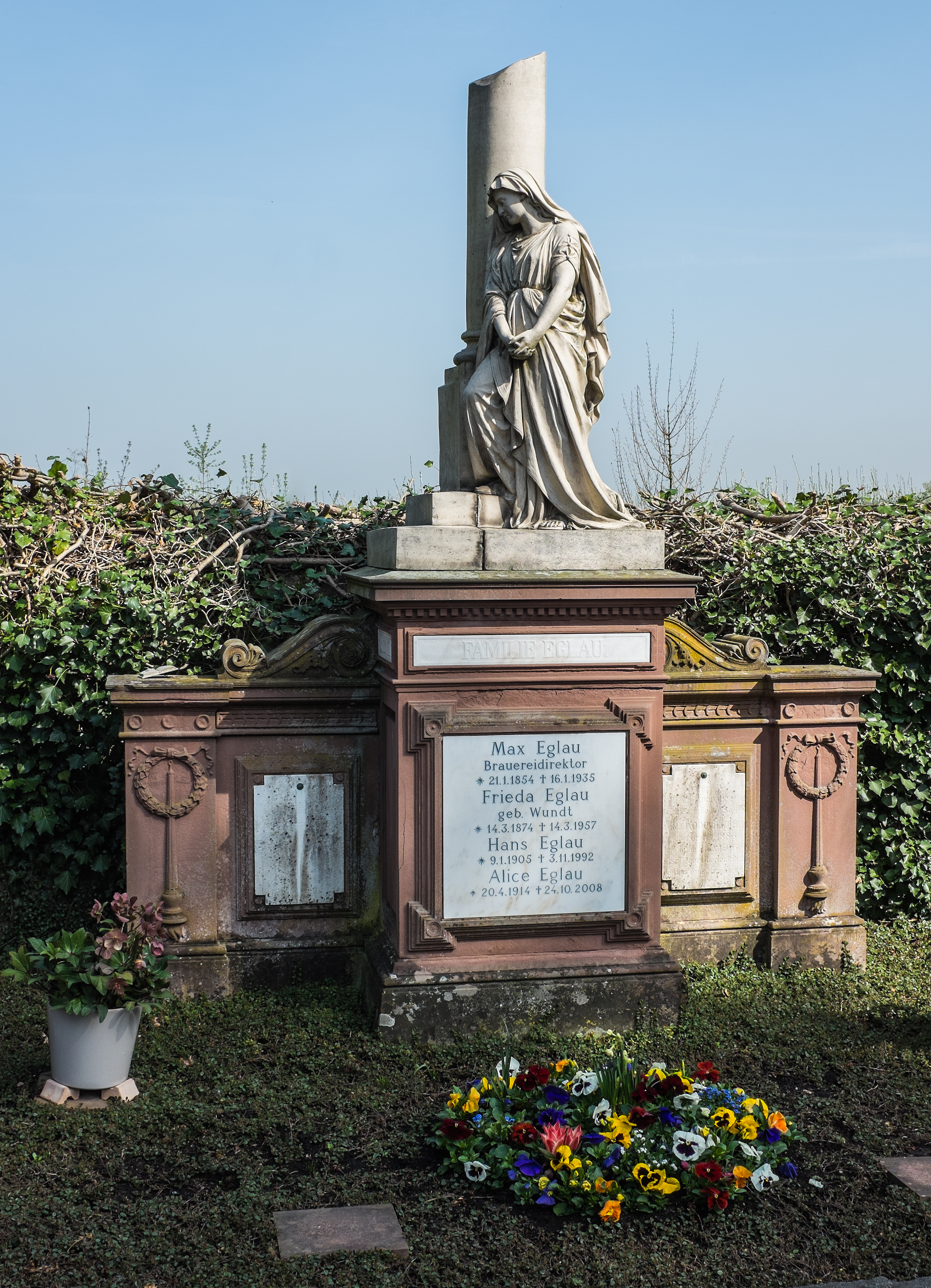 Bergfriedhof Durlach - Historisches Grabmal der Familie des Brauereidirektors Max Eglau